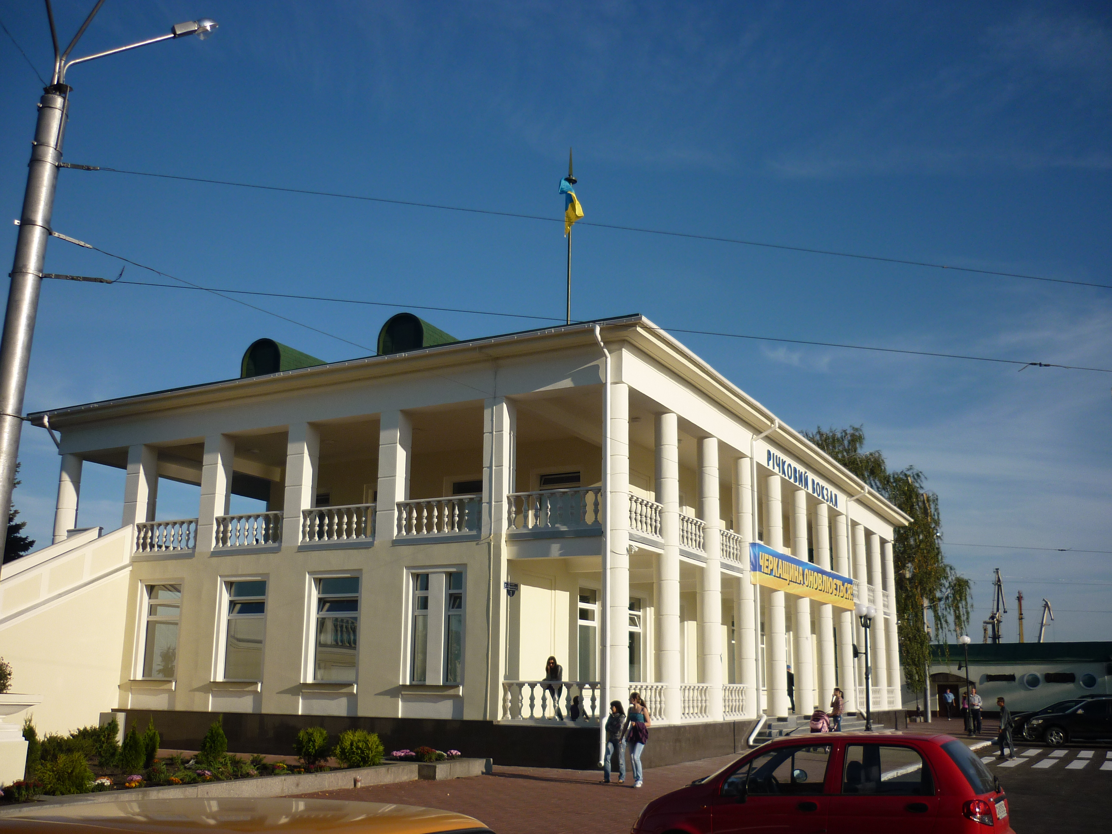 Відбудований та реставрований річковий вокзал в Черкасах